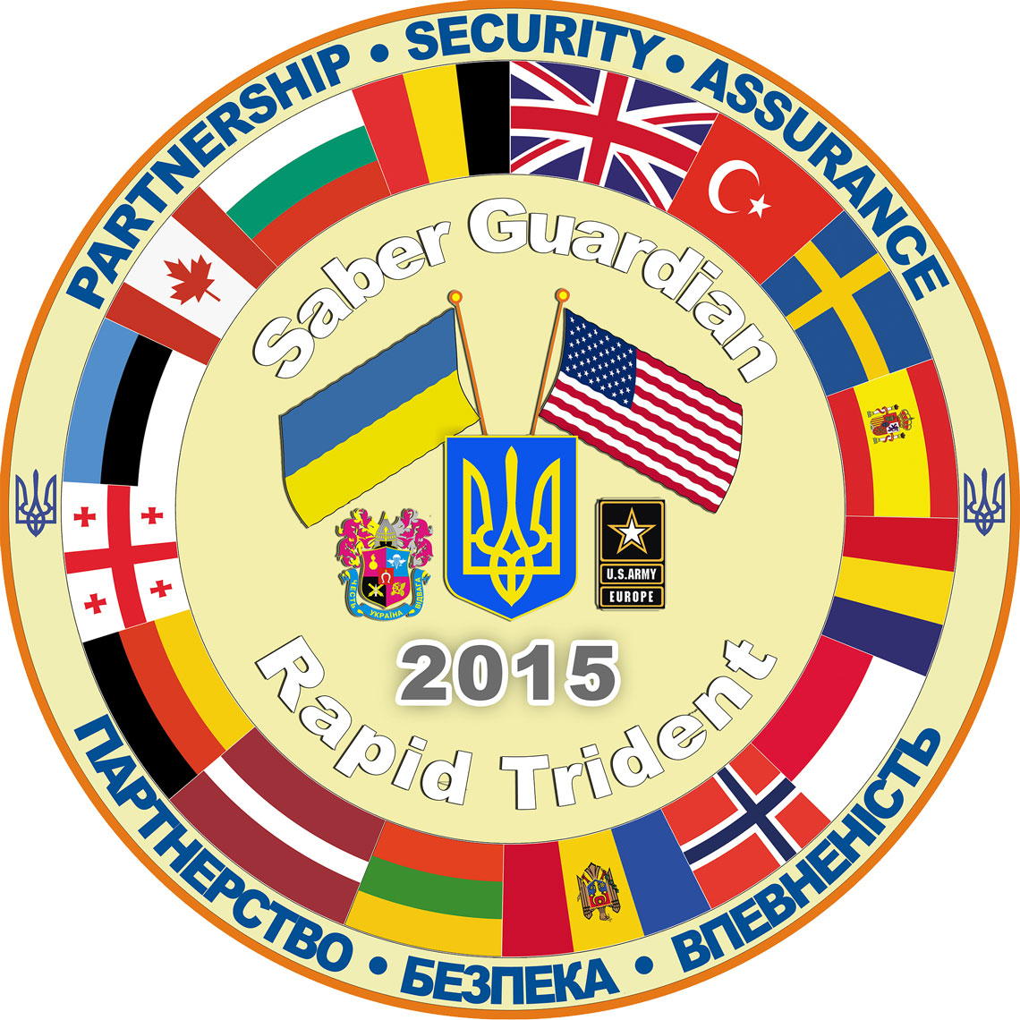 Rapid Trident Logo